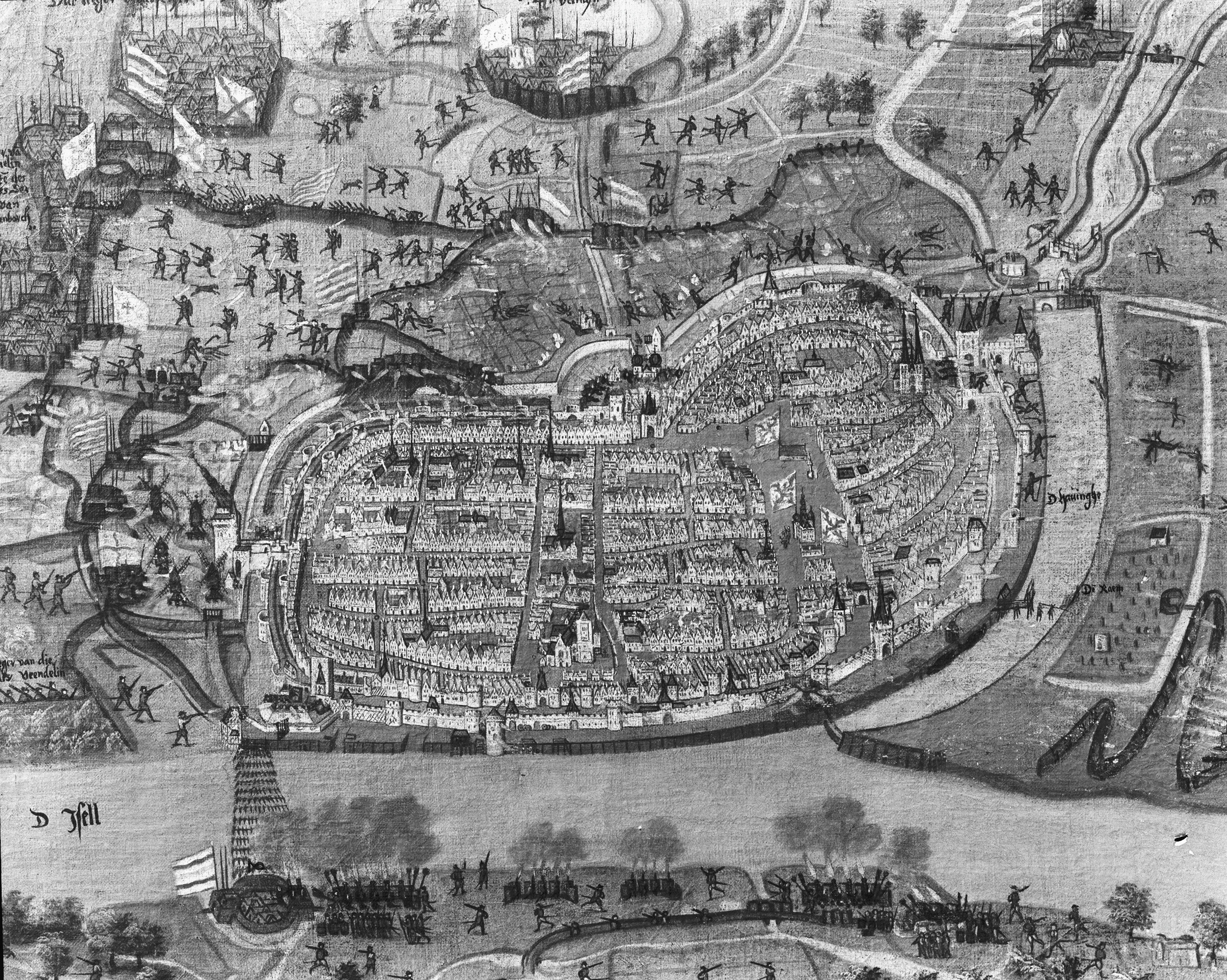 Plattegronden en overzichten: schilderij-stad in vogelvlucht-detail